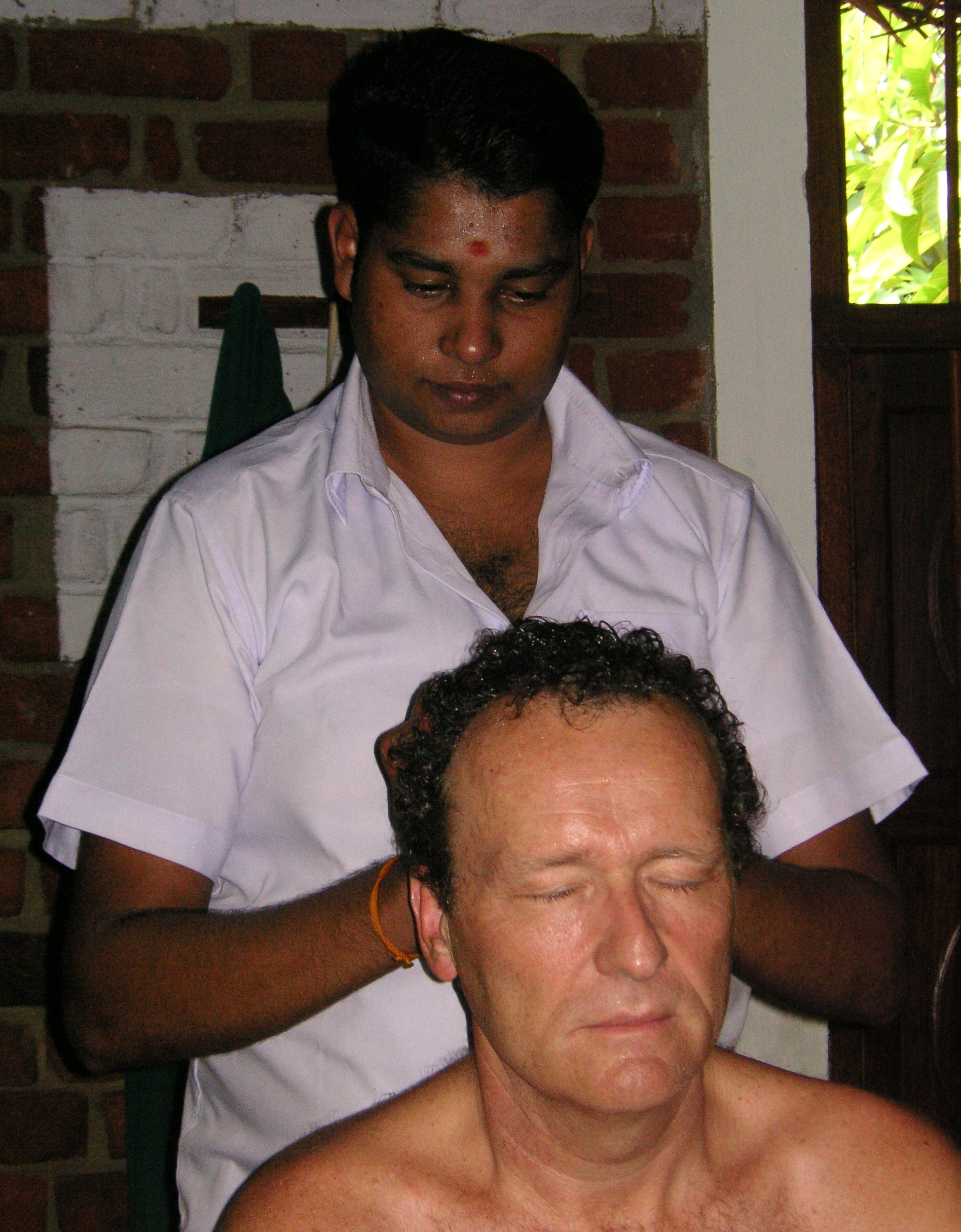 Kopfmassage